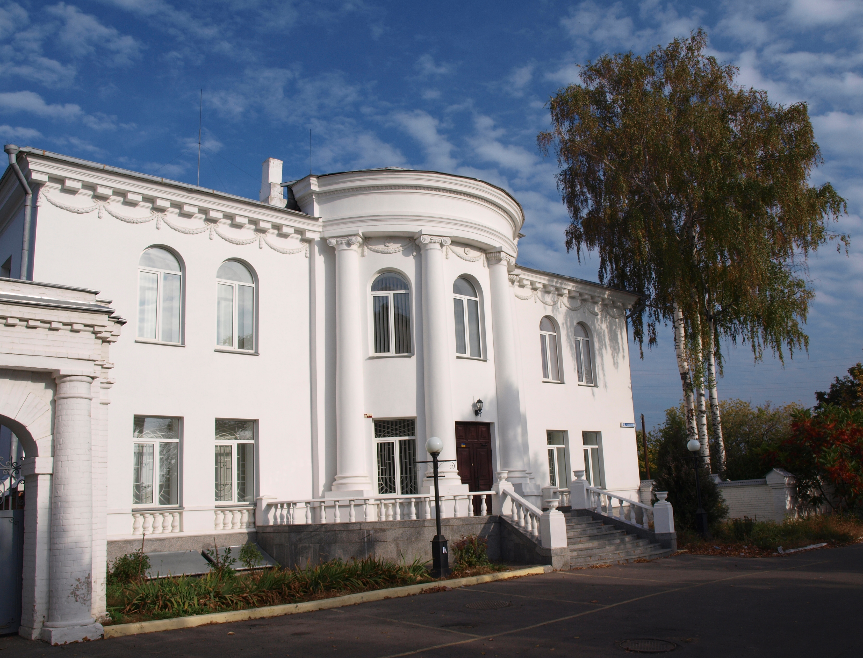 Особняк в Полтаве, построенный в 1912 году архитектором Павлом Алёшиным